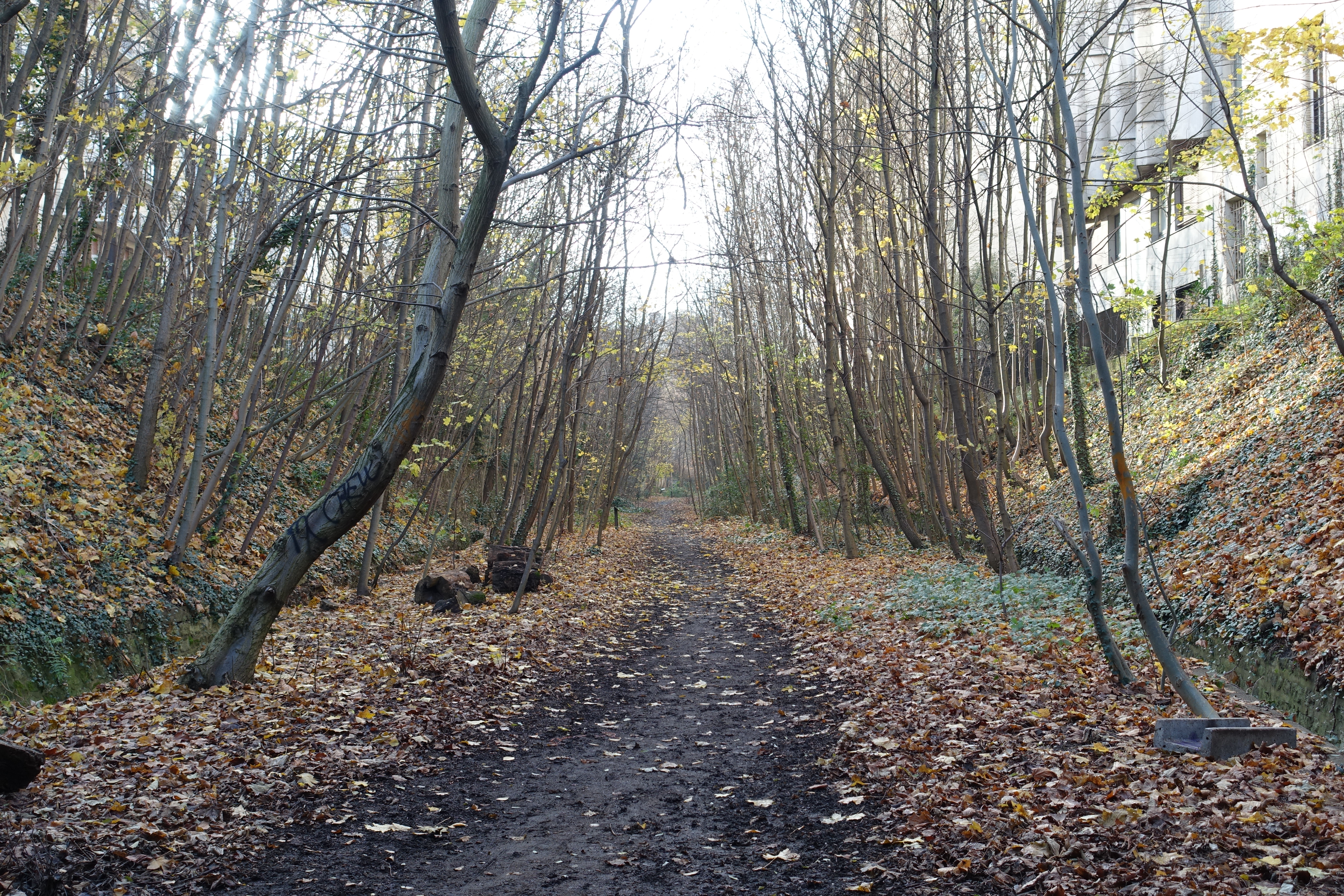 Petite Ceinture du 16e @ Paris